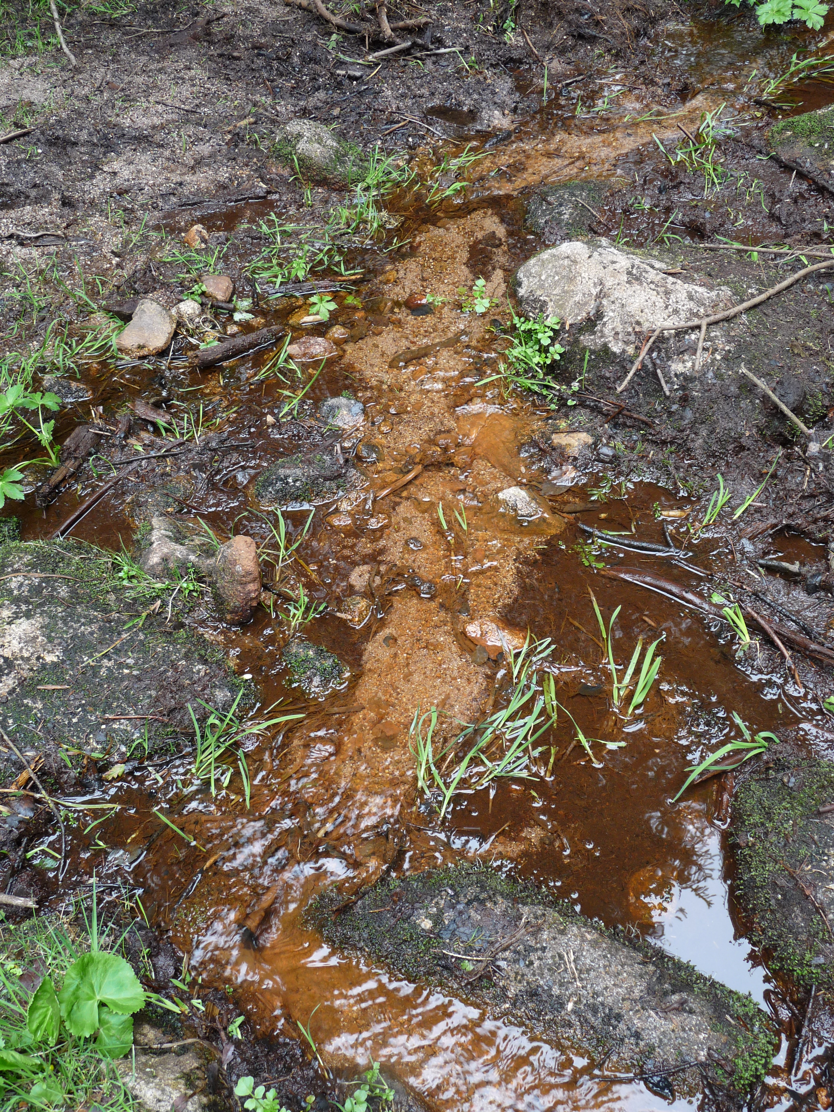 Source ferrugineuse de Mérelle (Gérardmer, Vosges)